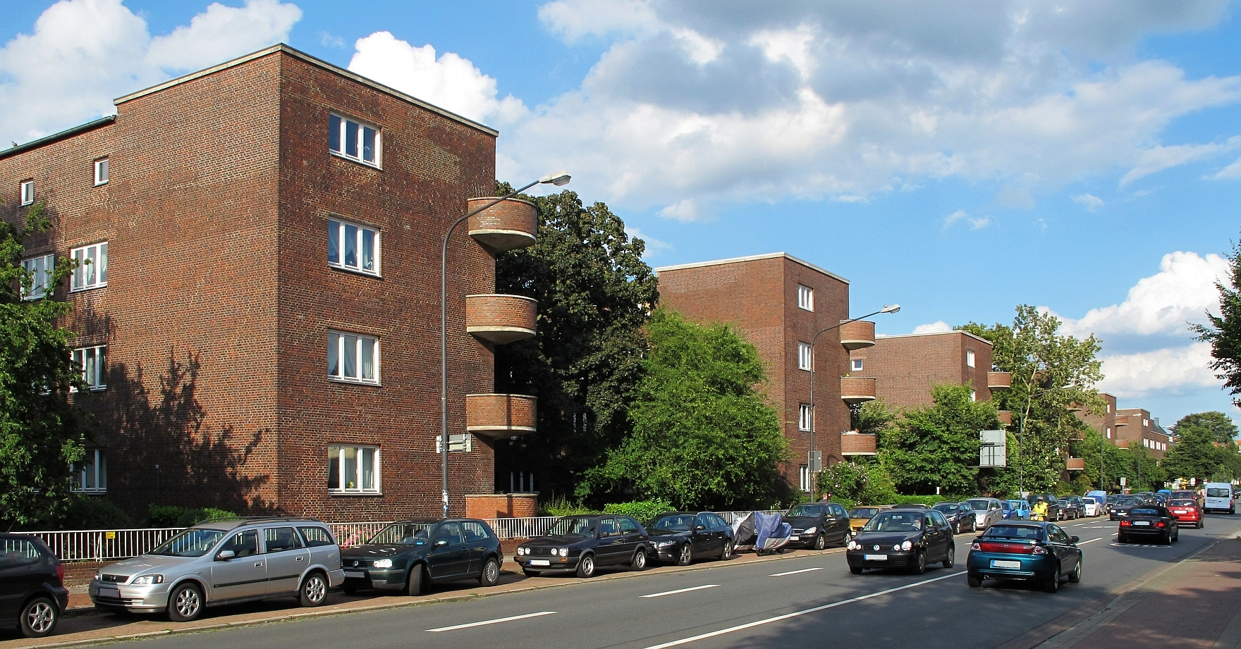 Wohnanlage Afa-Siedlung, Bremen im August 2014 (Ansicht entlang Bismarckstraße); Stadtteil: Östliche Vorstadt; Ortsteil: Fesenfeld; Baujahr: 1929-1930; Architekten: Willi Berg und Max Paasche (Hamburg) Das abgebildete Objekt ist ein geschütztes Kulturdenkmal in der Freien Hansestadt Bremen, mit der Nr. 0173 beim Landesamt für Denkmalpflege registriert.